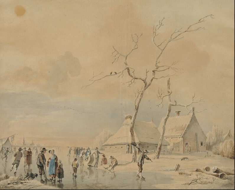 Winterszene (Ausschnitt)